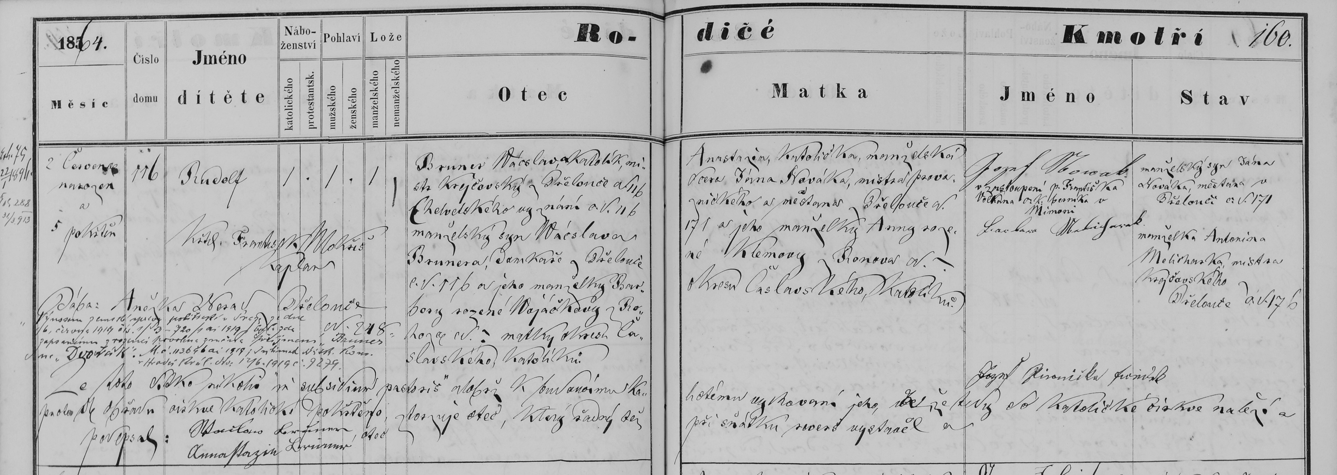 matriční zápis o narození a křtu Rudolfa Brunnera (matrika N 1857-1869 Přelouč (SOA Zámrsk))